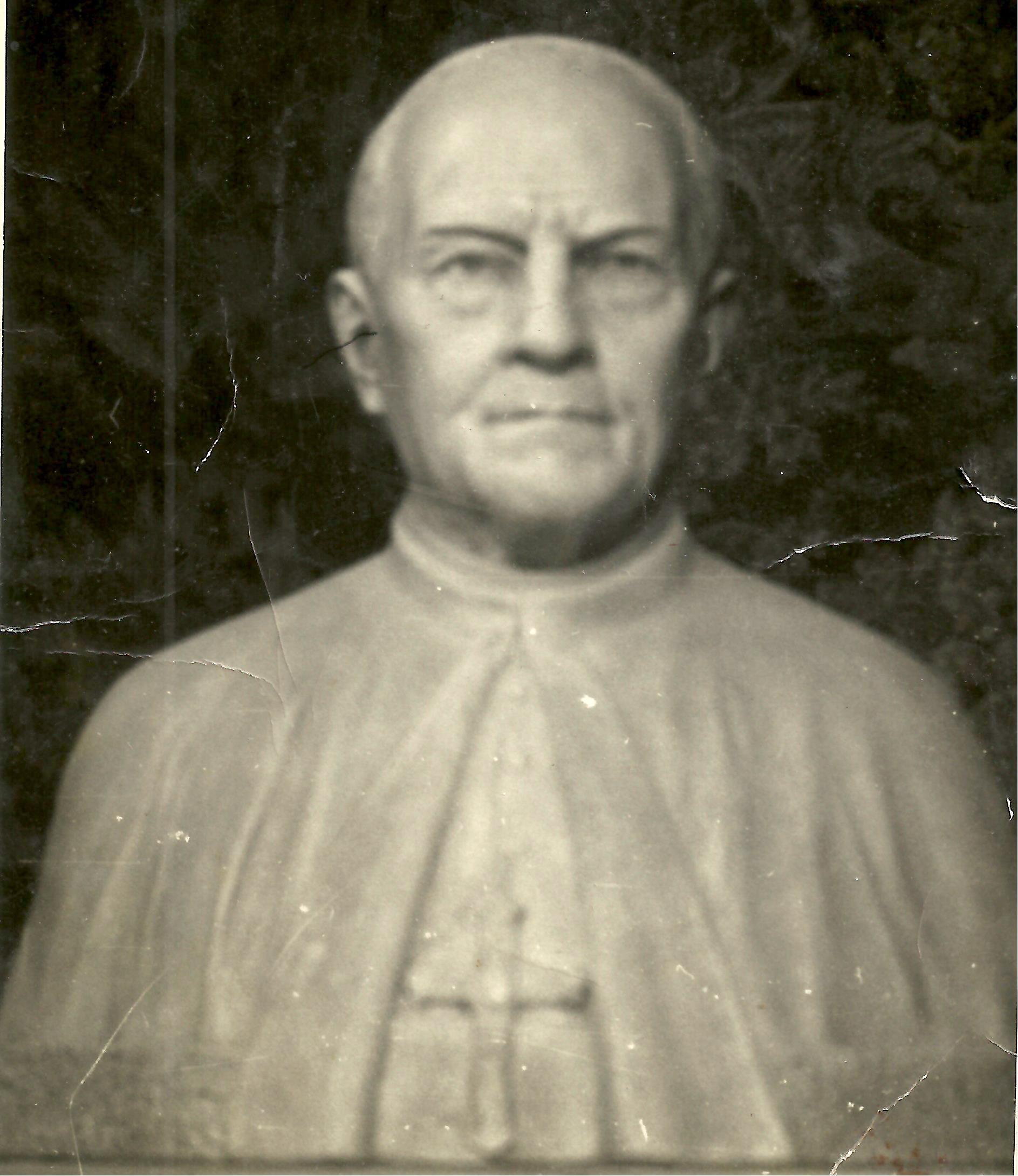 1955: busto de monseñor arzobispo Juan Sinforiano Bogarín, del escultor Erminio Blotta; piedra de Córdoba blanca, interior, en la Catedral, 70 kg y 7 dm de alto, yace en un monumento de granito de 16 dm de alto por 24 dm de largo. Monumento obra del Arq. Taglia. Comitente: monseñor Mena Porta, en la catedral.